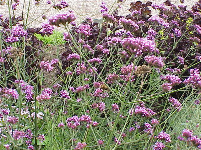 Species: Verbena bonariensis Family: Verbenaceae Image No. 3